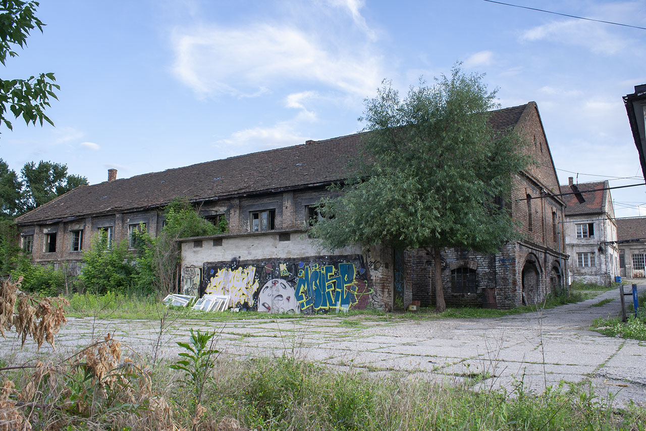 Топовске шупе јула 2013. године